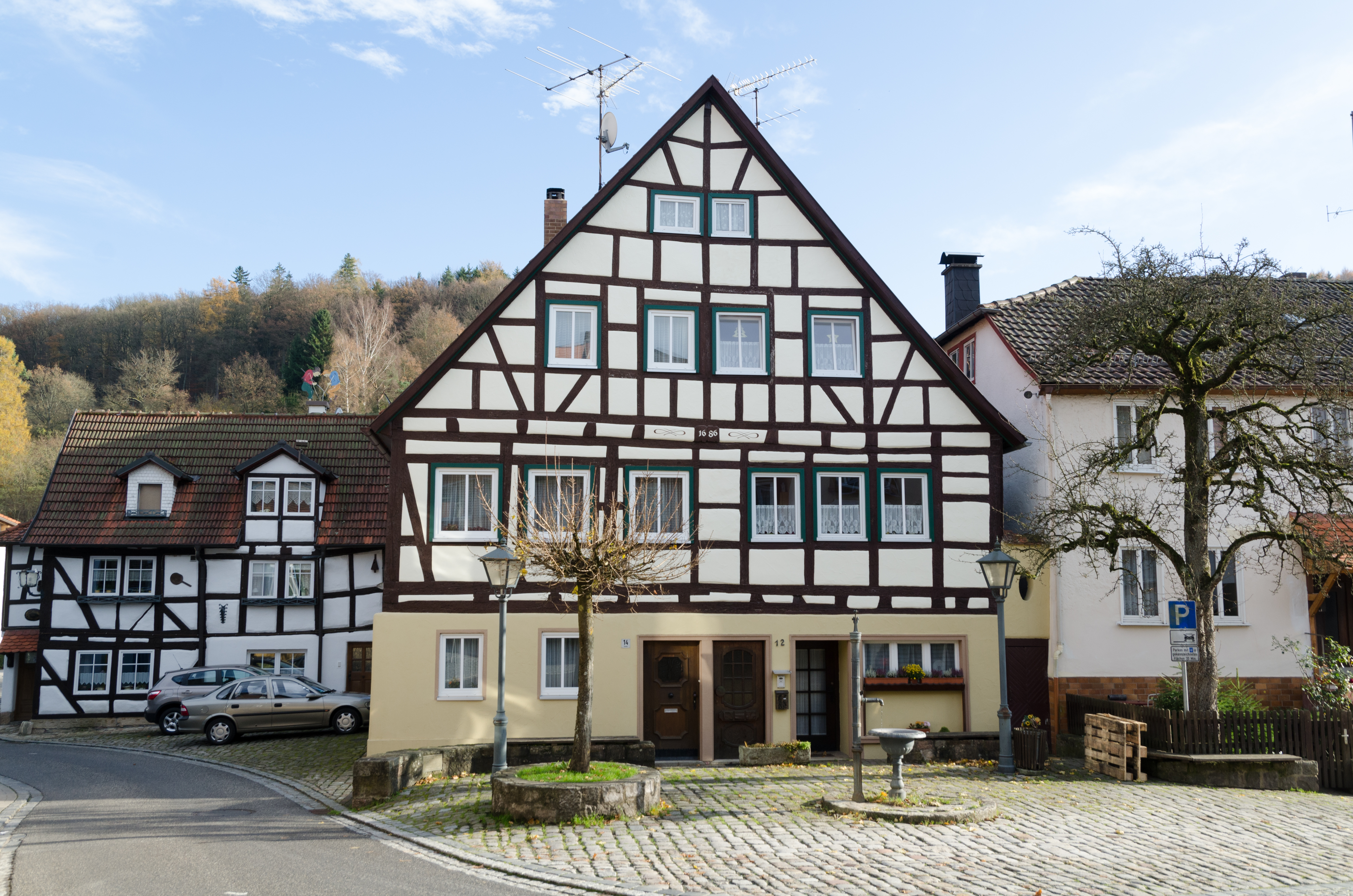 Bad Brückenau, Sinntor 12 und 14